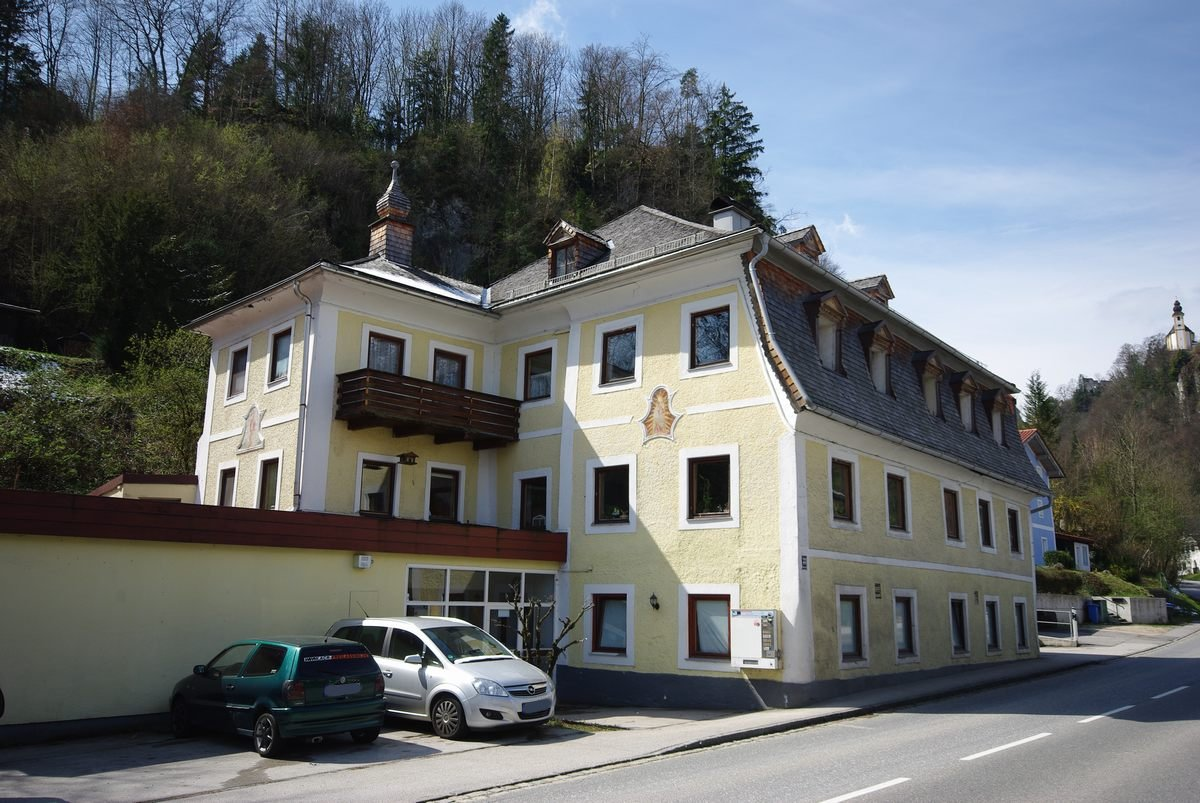 Gasthof Kaitl, Bad ReichenhallThis is a photograph of an architectural monument.